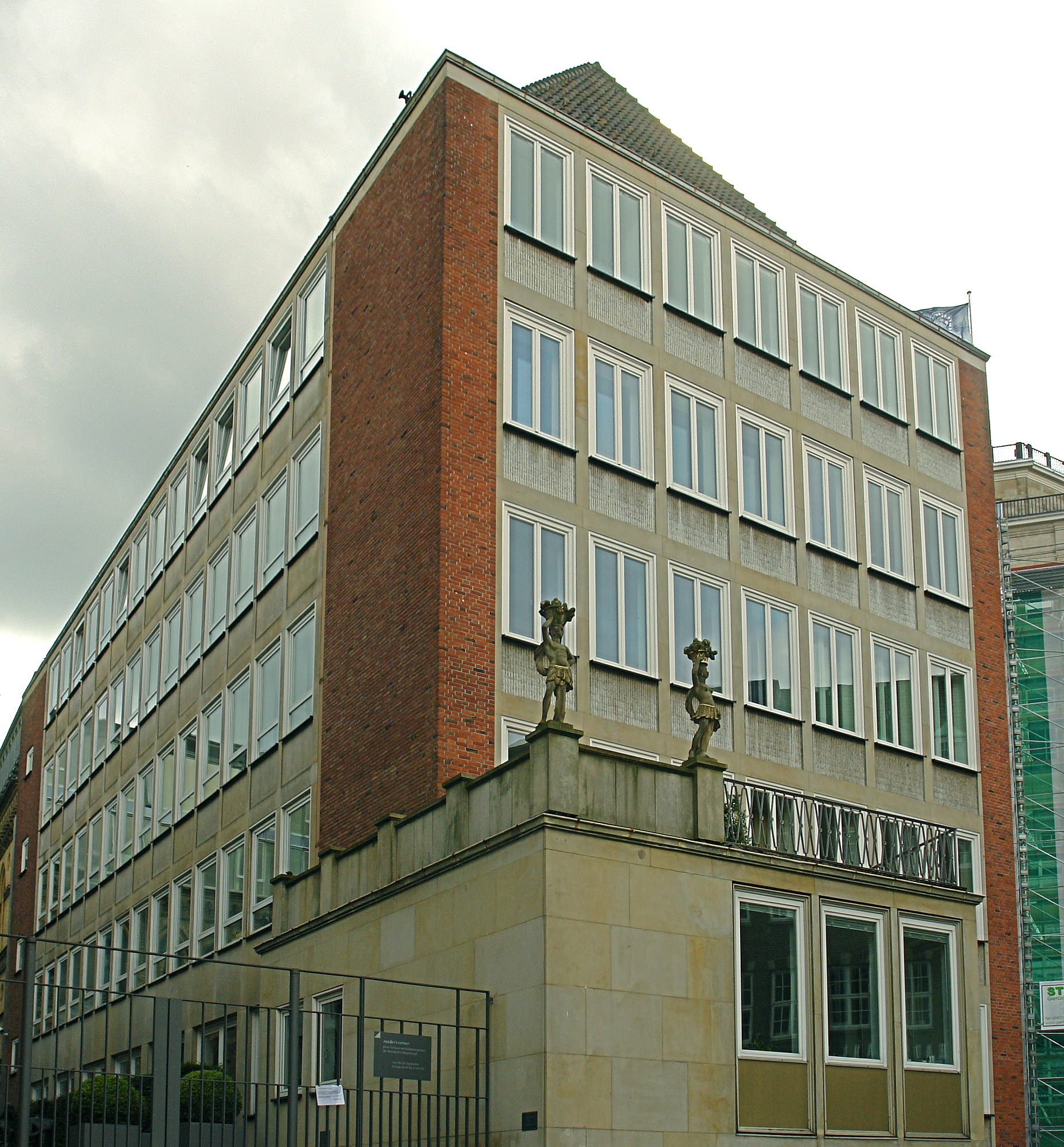 Haus C der Handelskammer Bremen in Bremen, Marktstraße 3 / Am Markt - Marktseite.Das abgebildete Objekt ist ein geschütztes Kulturdenkmal in der Freien Hansestadt Bremen, mit der Nr. 0213 beim Landesamt für Denkmalpflege registriert.